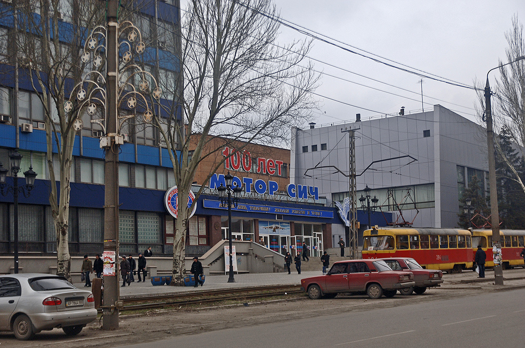 Motor Sich проходная